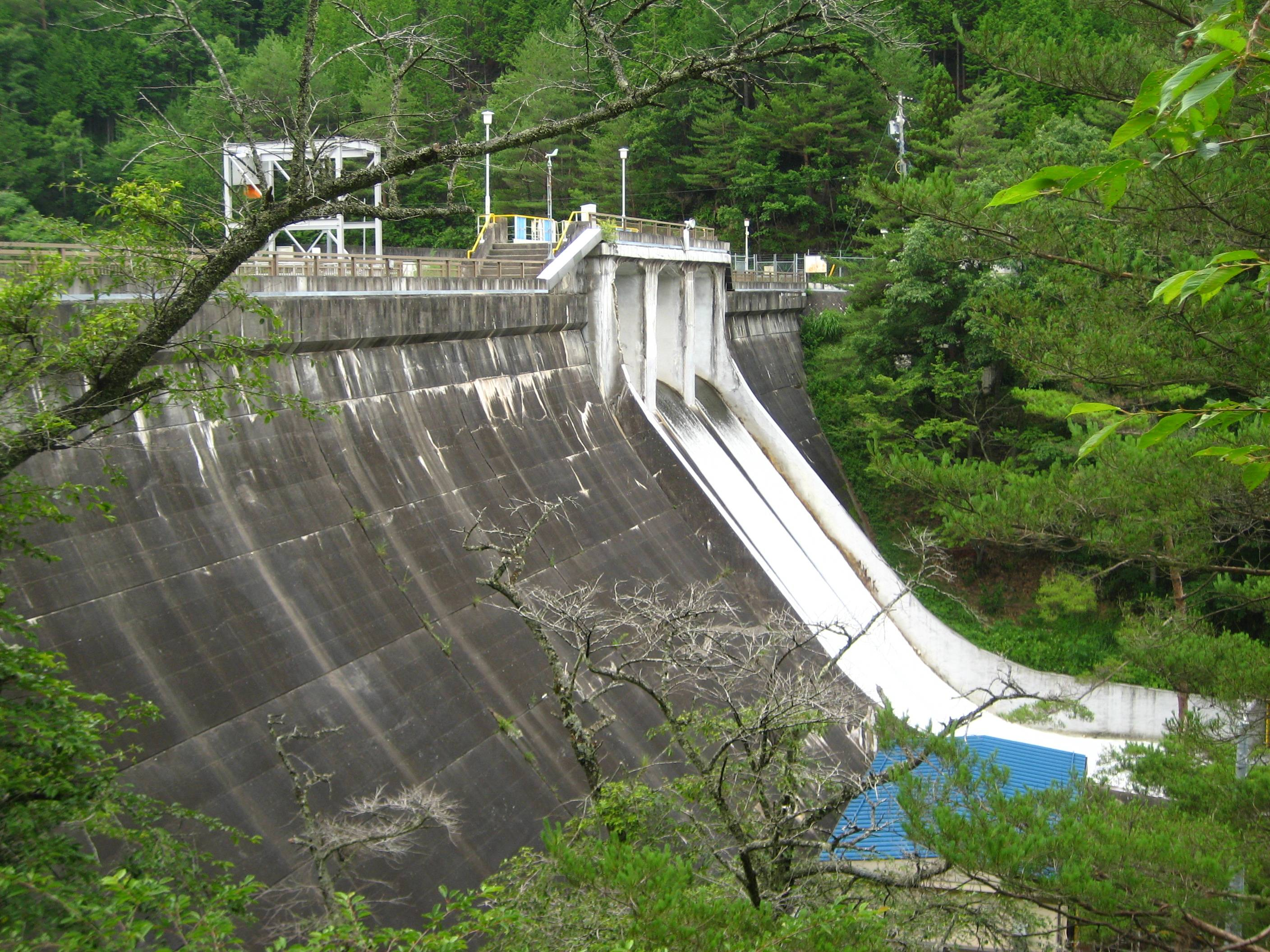 Iwakura Dam (岩倉ダム) in Urugi village, Nagano prefecture, Japan.